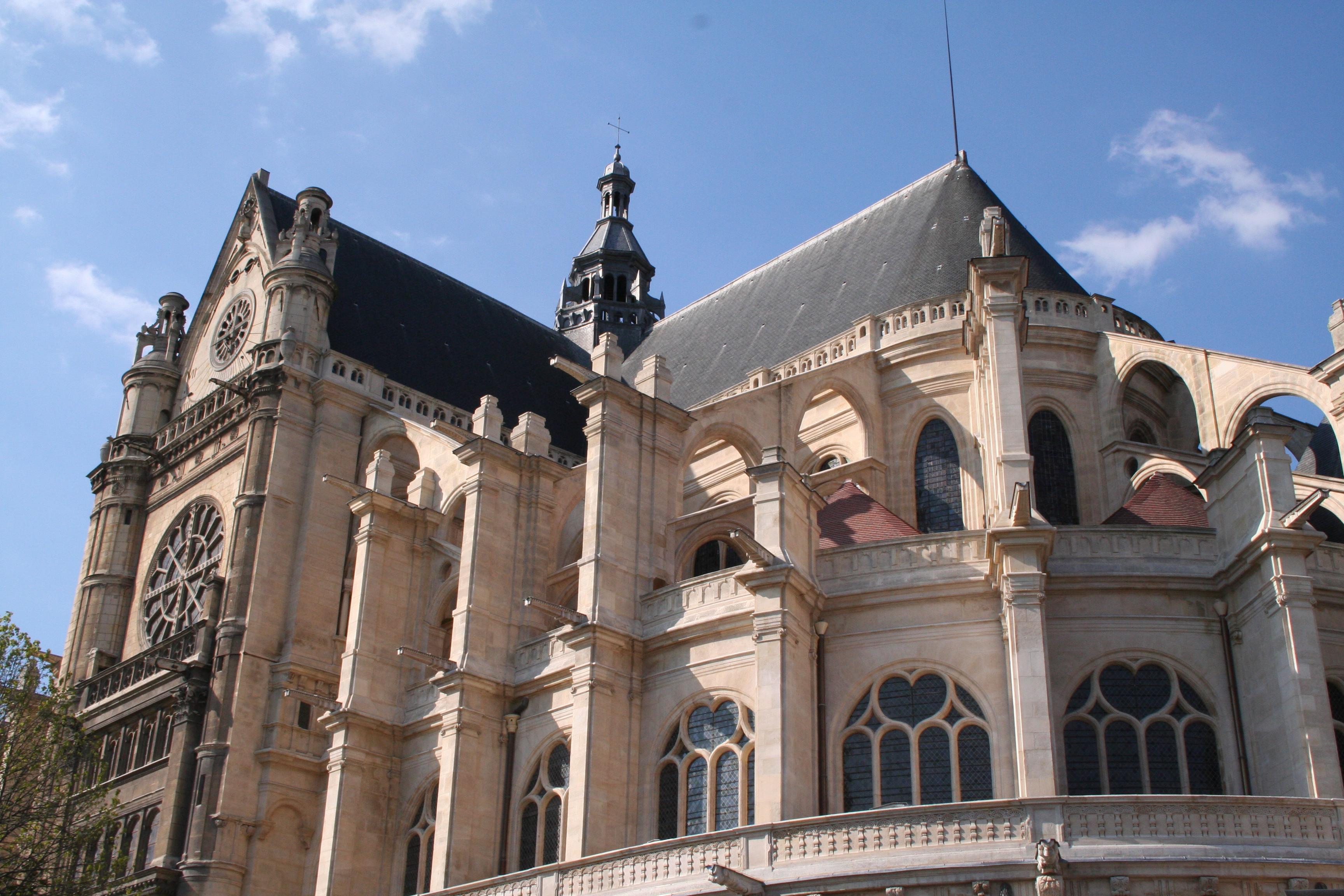 Église Saint-Eustache (Paris, France).